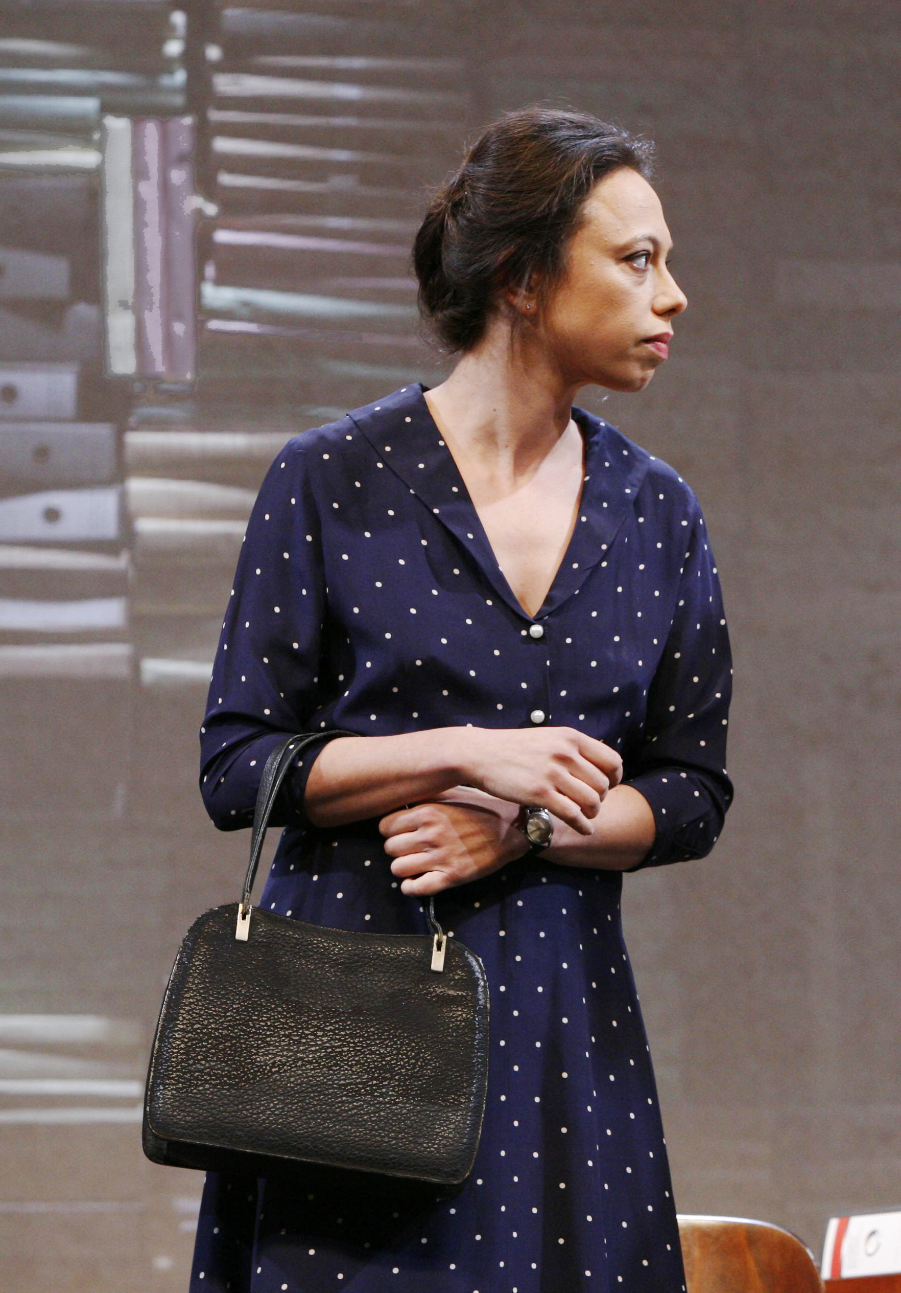 קרן צור כאנדה